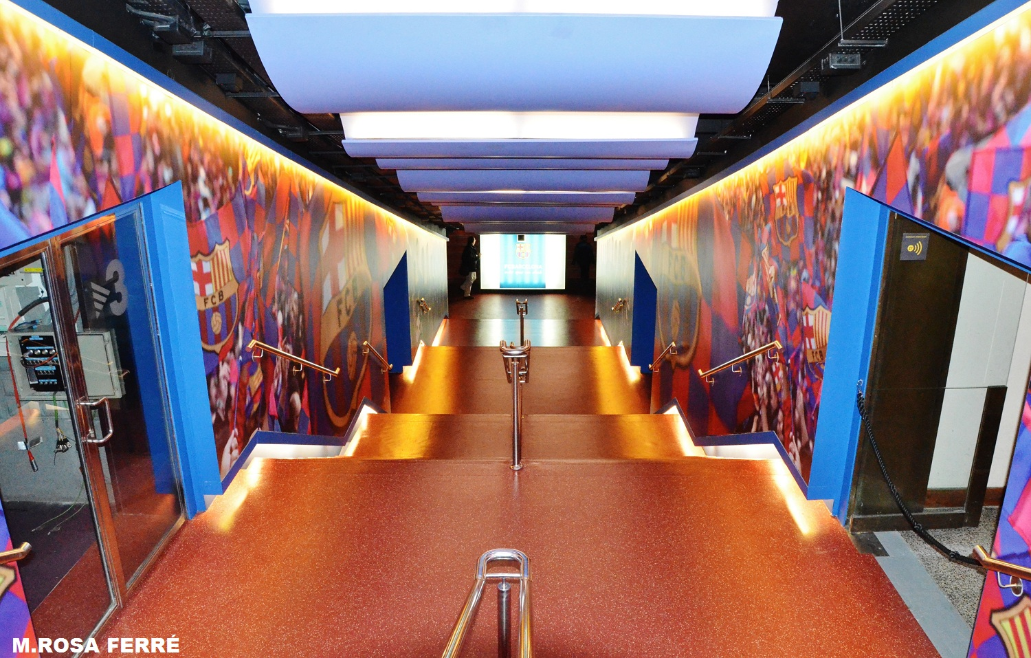 Camp Nou (Barcelona)